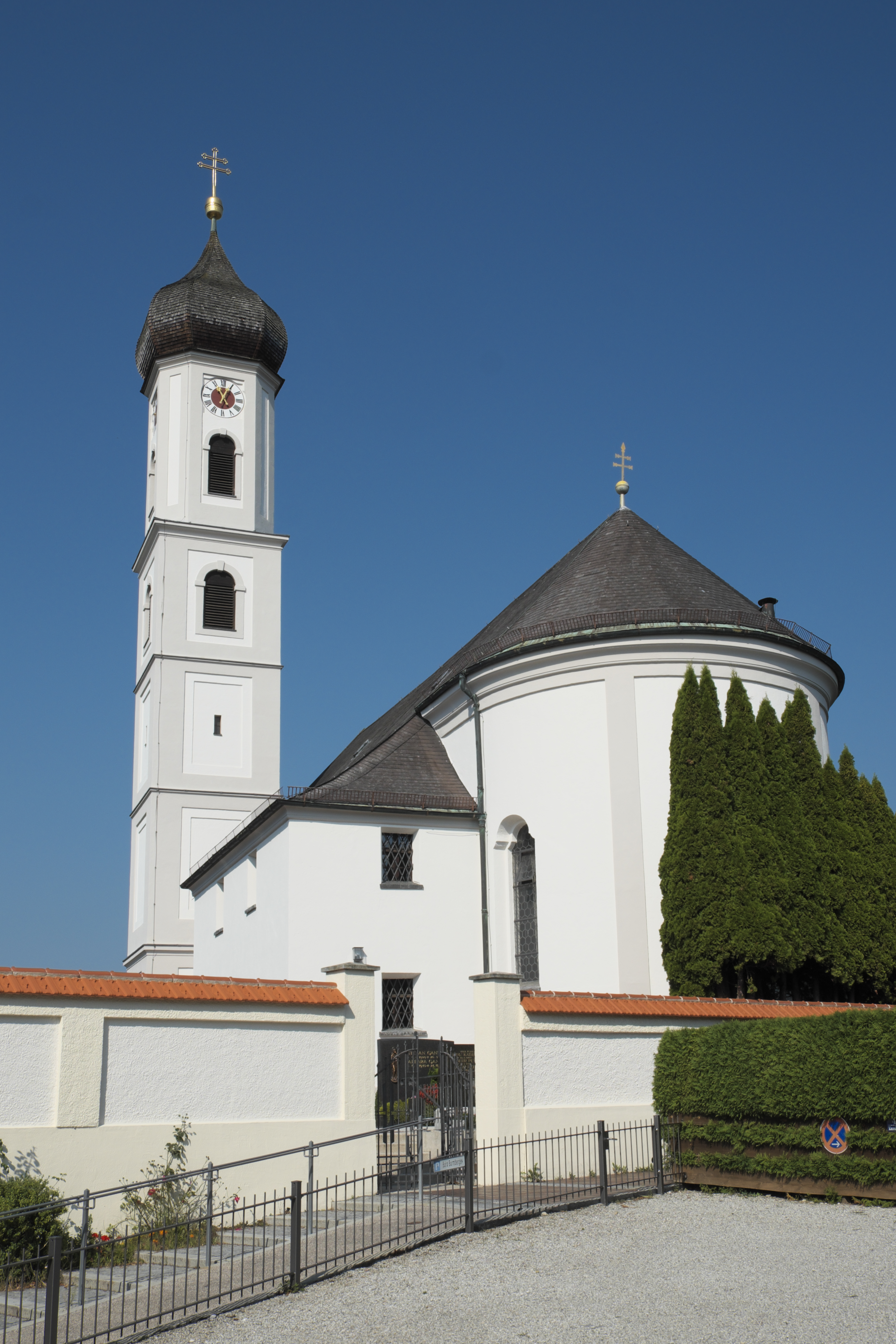 Katholische Pfarrkirche St. Valentin in Unterföhring im Landkreis München (Bayern/Deutschland)